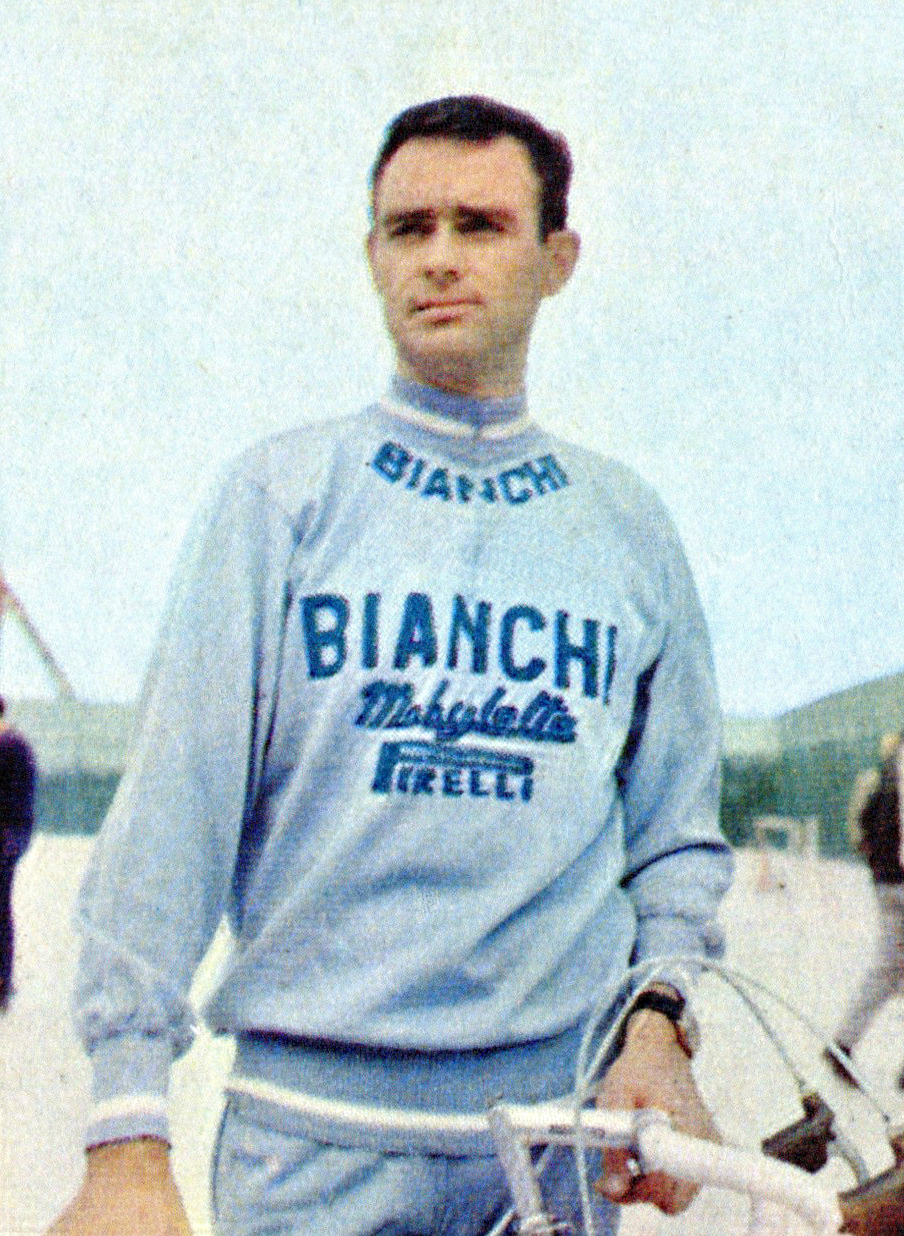 CAMPIONI DELLO SPORT 1966/67 - Figurina/Sticker n. 229 - I. MASSIGNAN -Rec